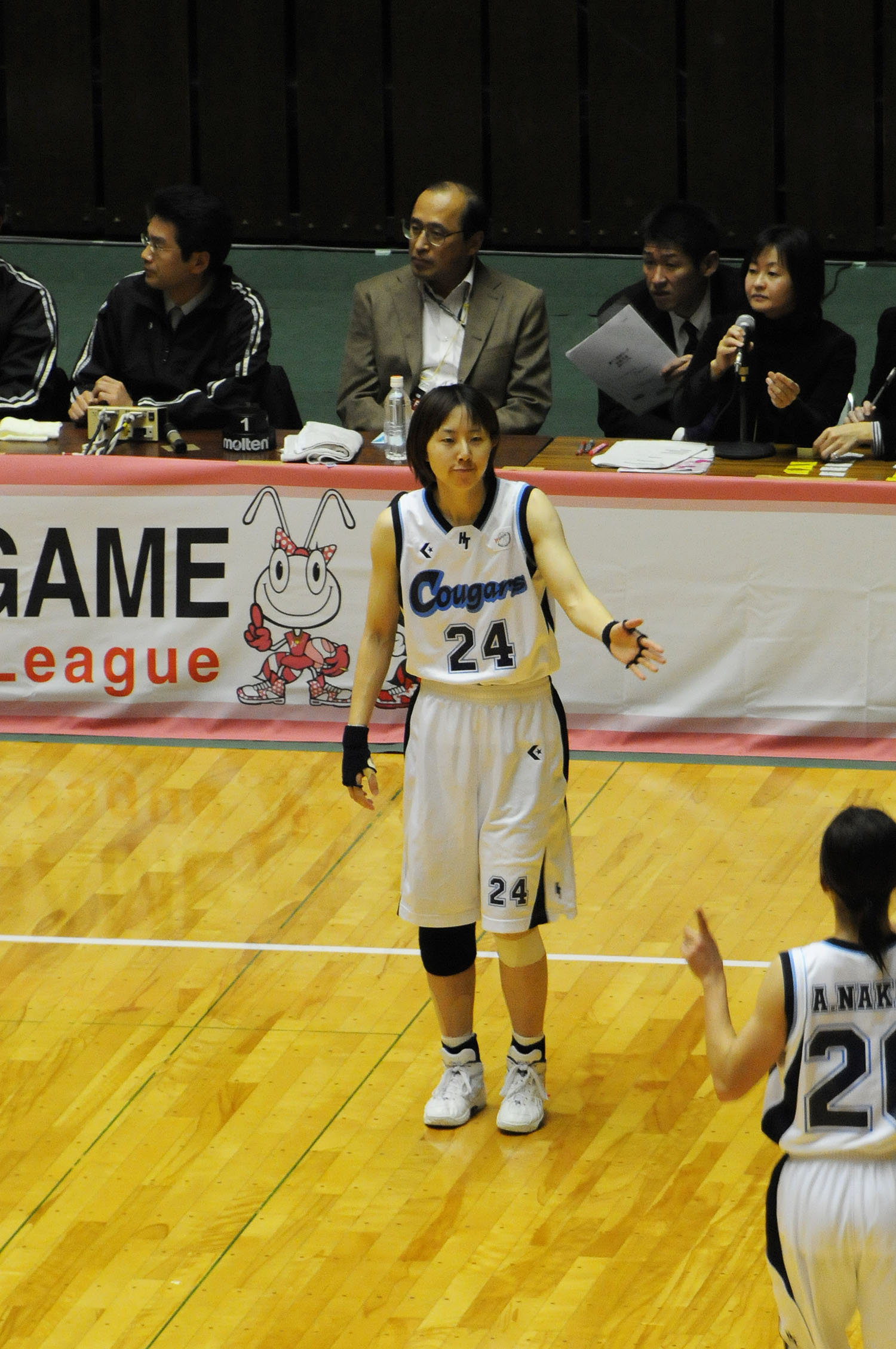 日立ハイテク クーガーズの阿部真弓選手。秋田県立体育館で。